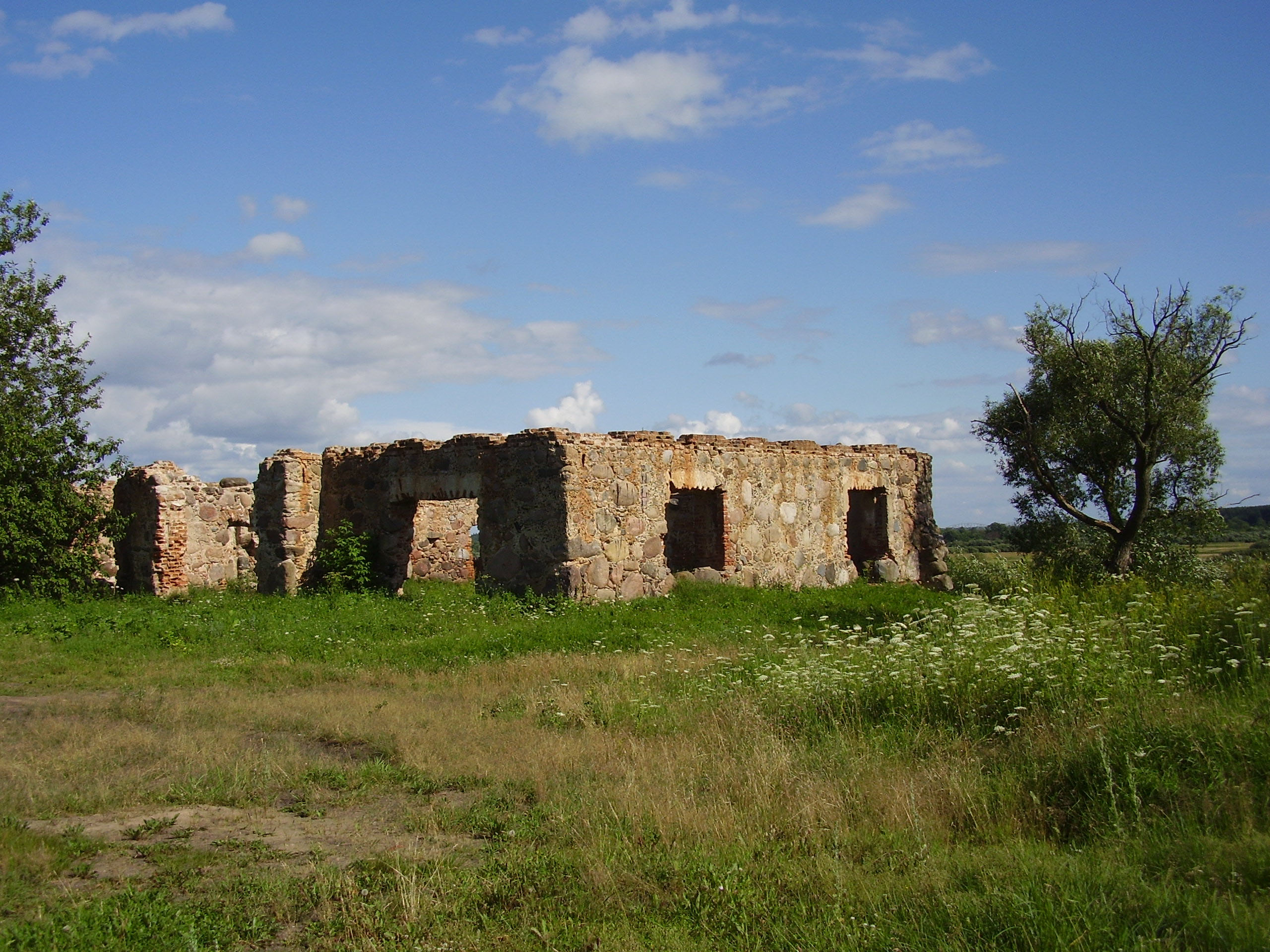 Беларуская (тарашкевіца): Гарадзішча. в. Свіслач This is a photo of Belarusian heritage monument. Reference number: 513В000588 ( WLM)